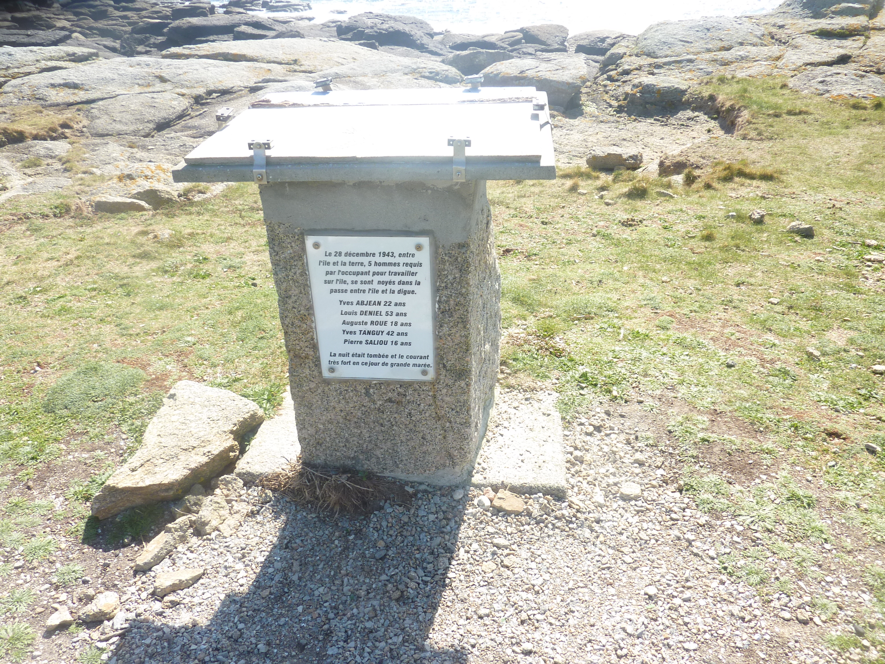 Porspoder : plaque commémorative située au port de Melon en souvenir du drame survenu le 28 décembre 1943 (noyade de 5 hommes requis par l'occupant allemand pour travailler sur l'île Melon).